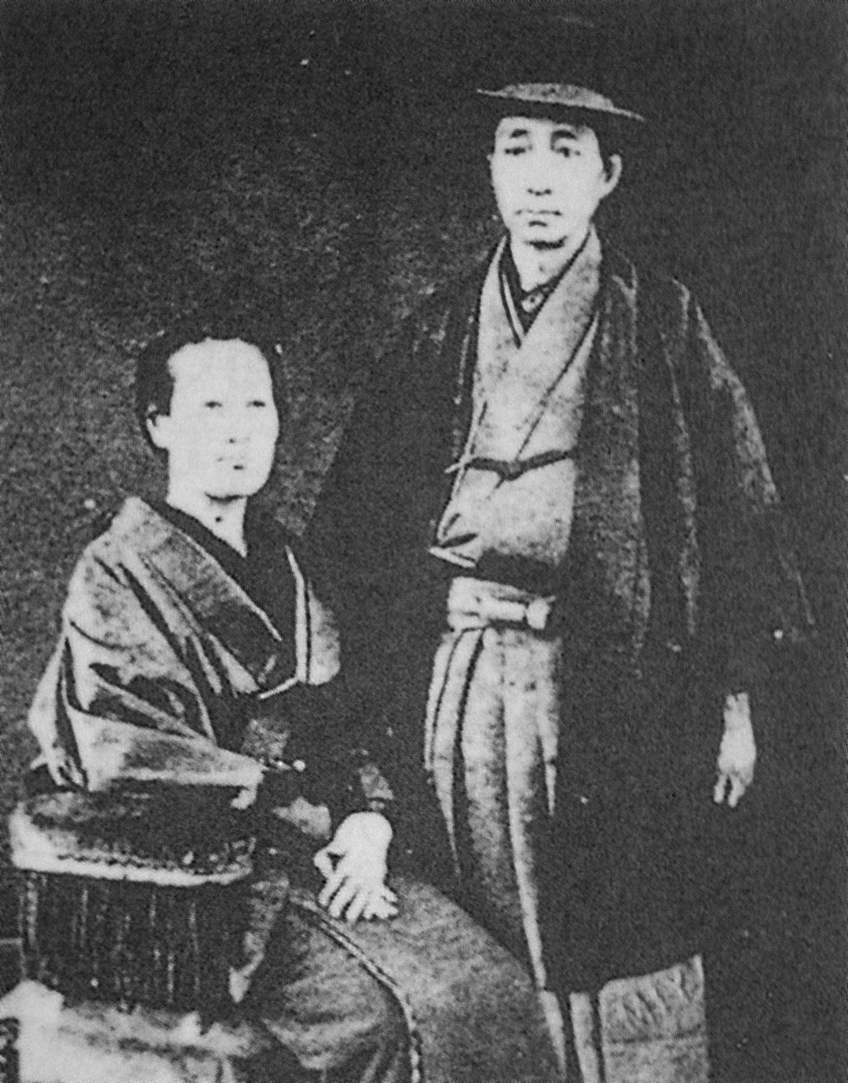 安藤直裕とその妻の肖像写真。